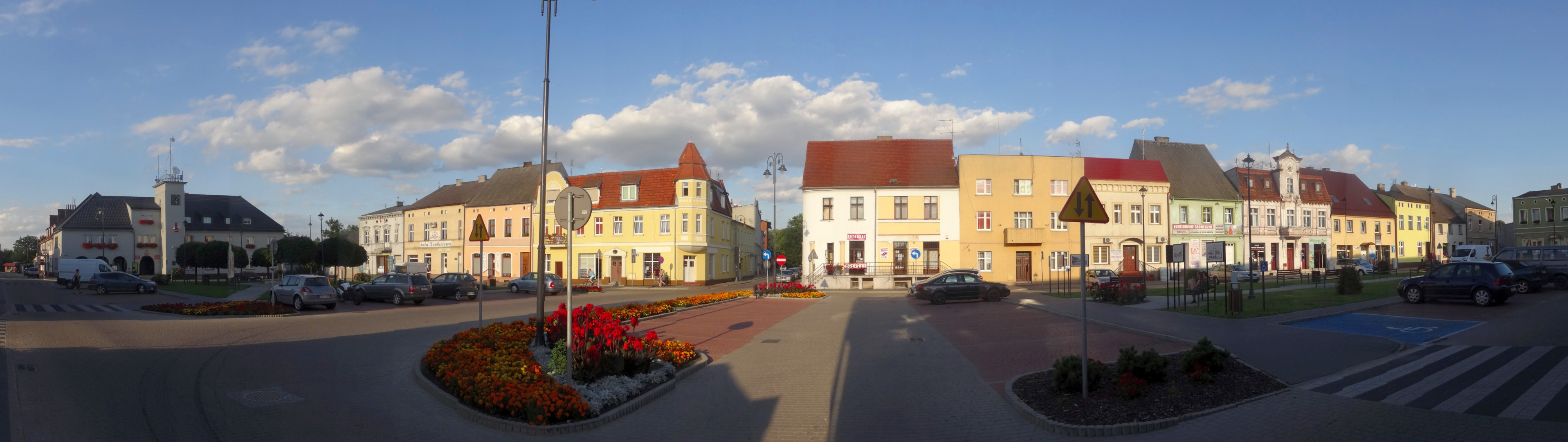 Rynek (plac Tysiąclecia) w Łabiszynie